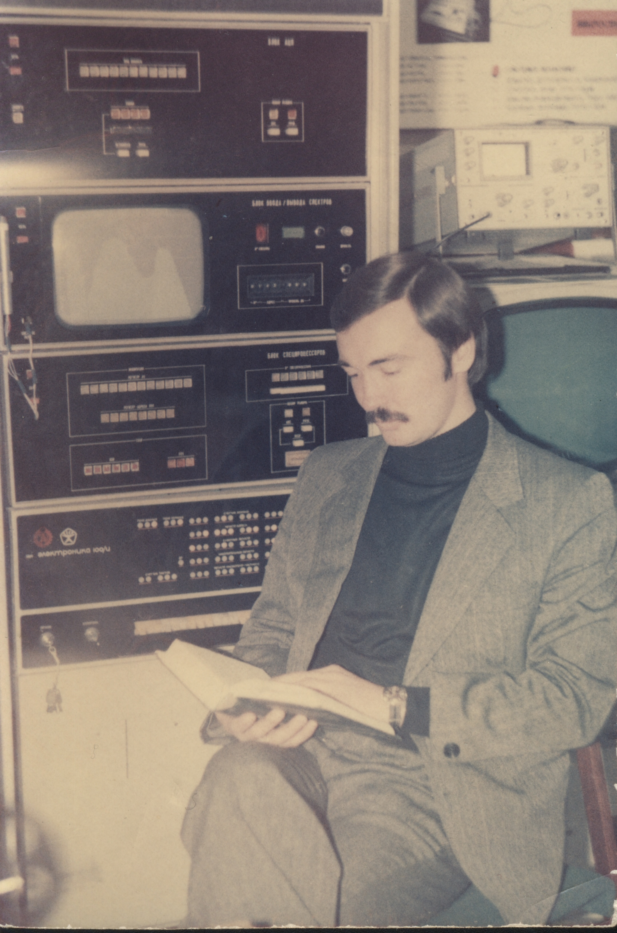 Александр Александрович Петровский (1980 г.). На заднем плане разработанная им цифровая система "УВС Вектор", удостоенная серебряной медали ВДНХ СССР в 1981 г.